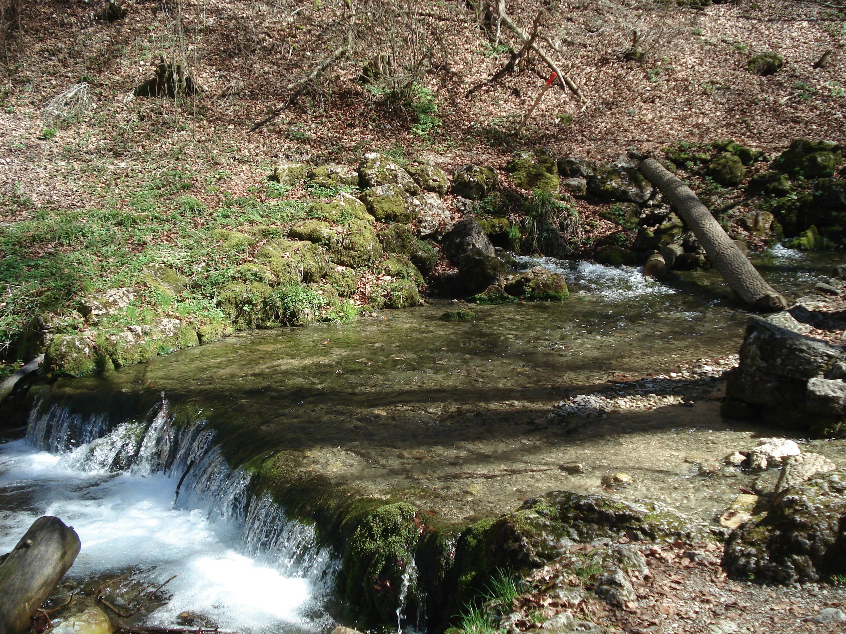 Die unteren Echazquellen